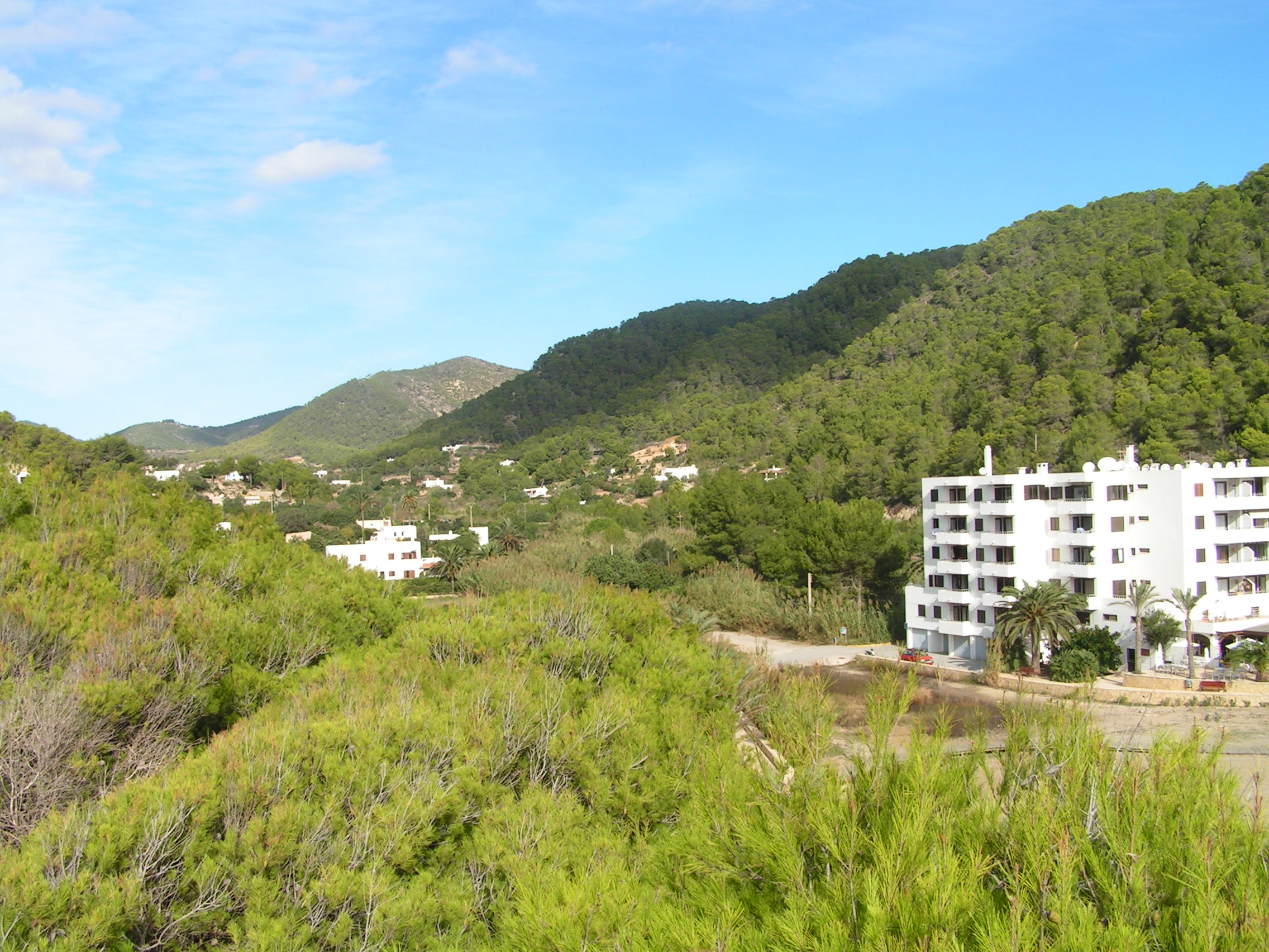 Sant Vicent de sa Cala, North East Ibiza